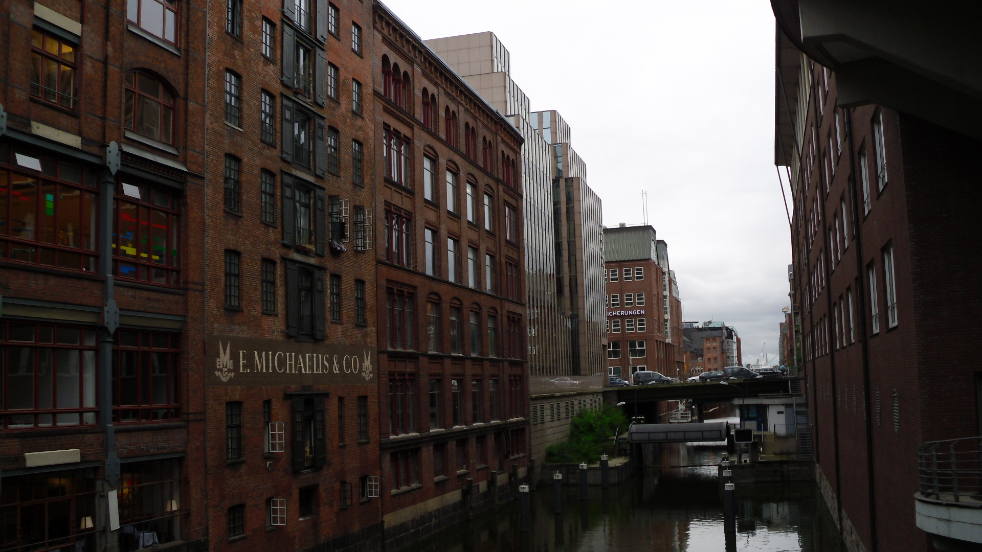 Ehemaliges Geschäftsgebäude des jüdischen Kaufmanns Eduard Michaels (1771-1847) am Herrengrabenfleet in Hamburg-Neustadt. Er handelte mit Papier. Das heutige Nachfolgeunternehmen ist die IGEPA group.This is a photograph of an architectural monument.